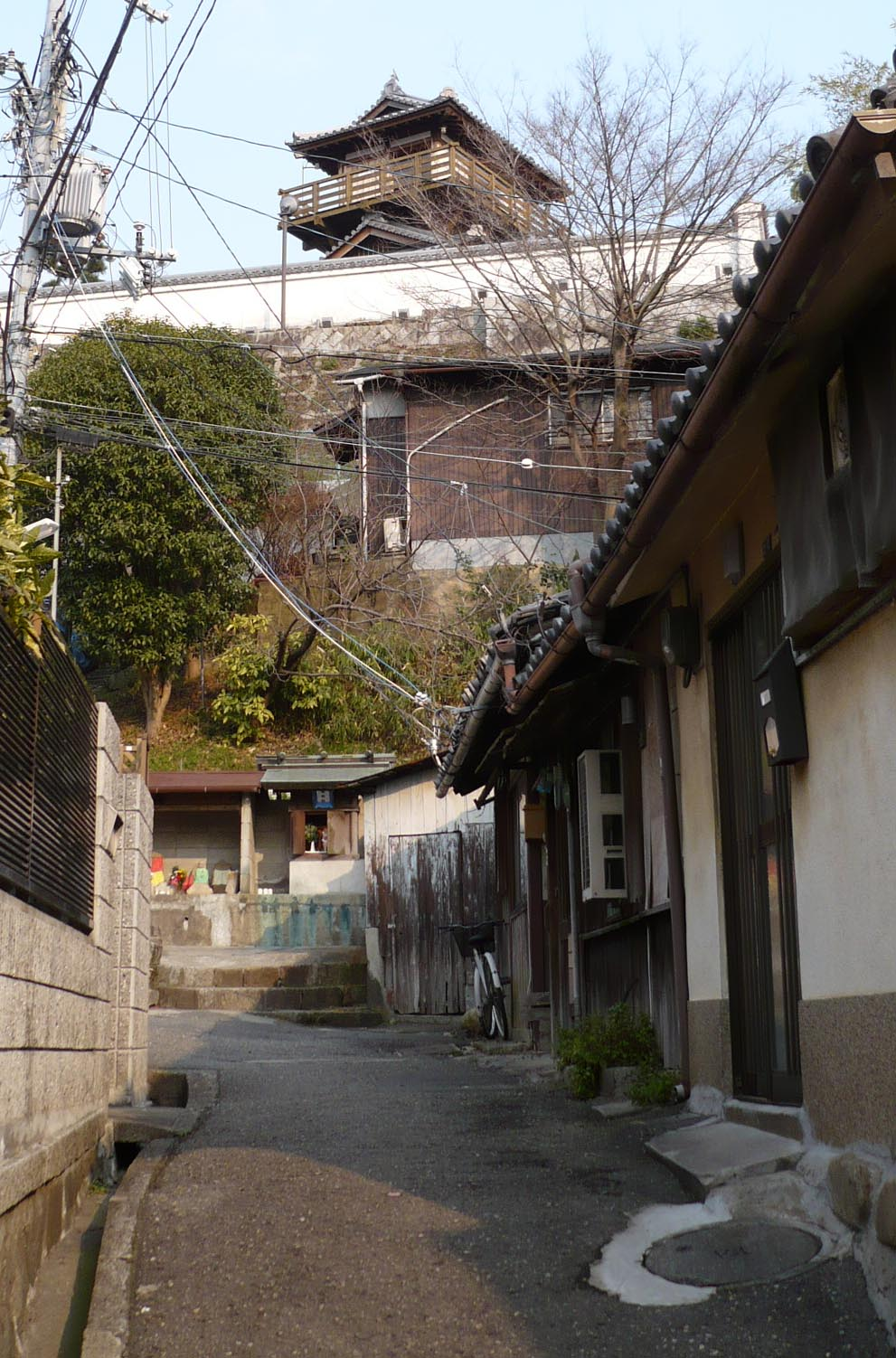 急峻にそびえ立つ池田城